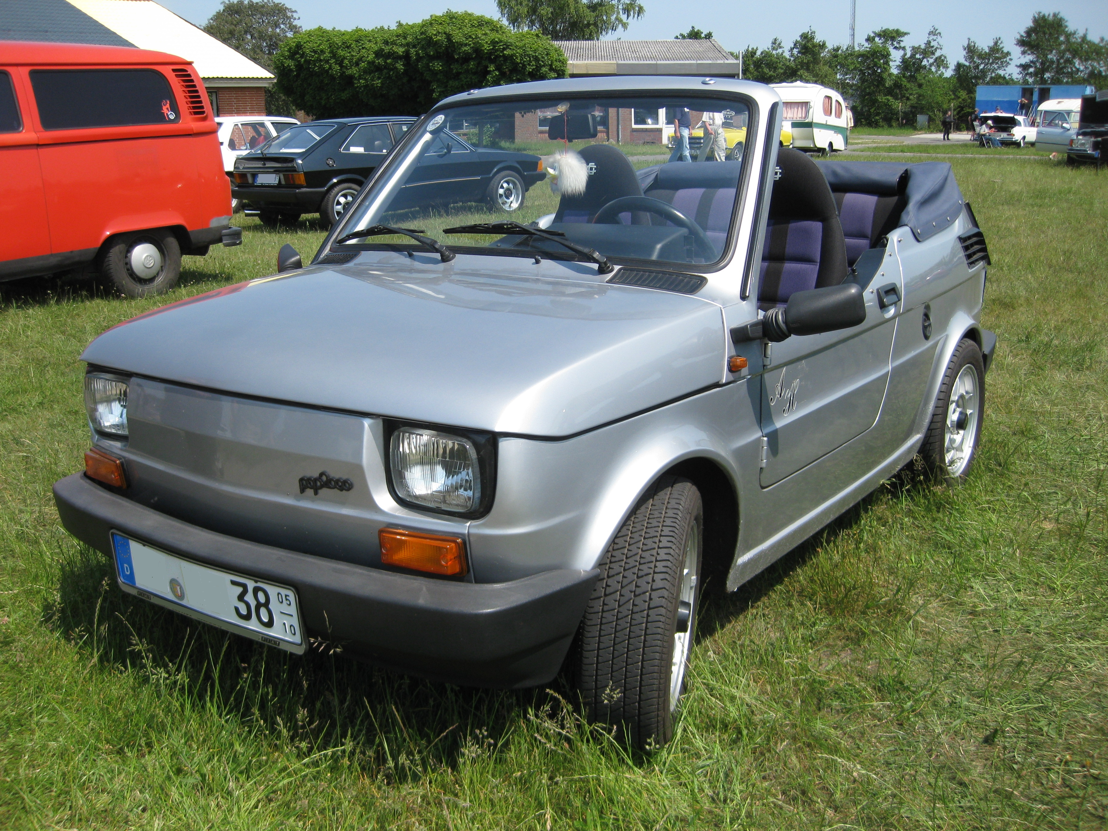 Fiat 126 Cabrio - Pop2000